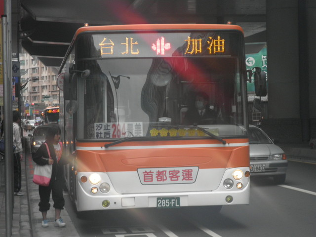 首都客運2007年DAEWOO BC211MA大客車285-FL車頭。